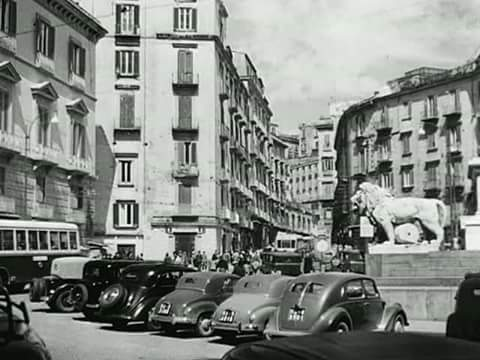 Napoli, piazza dei Martiri. Autore sconosciuto.